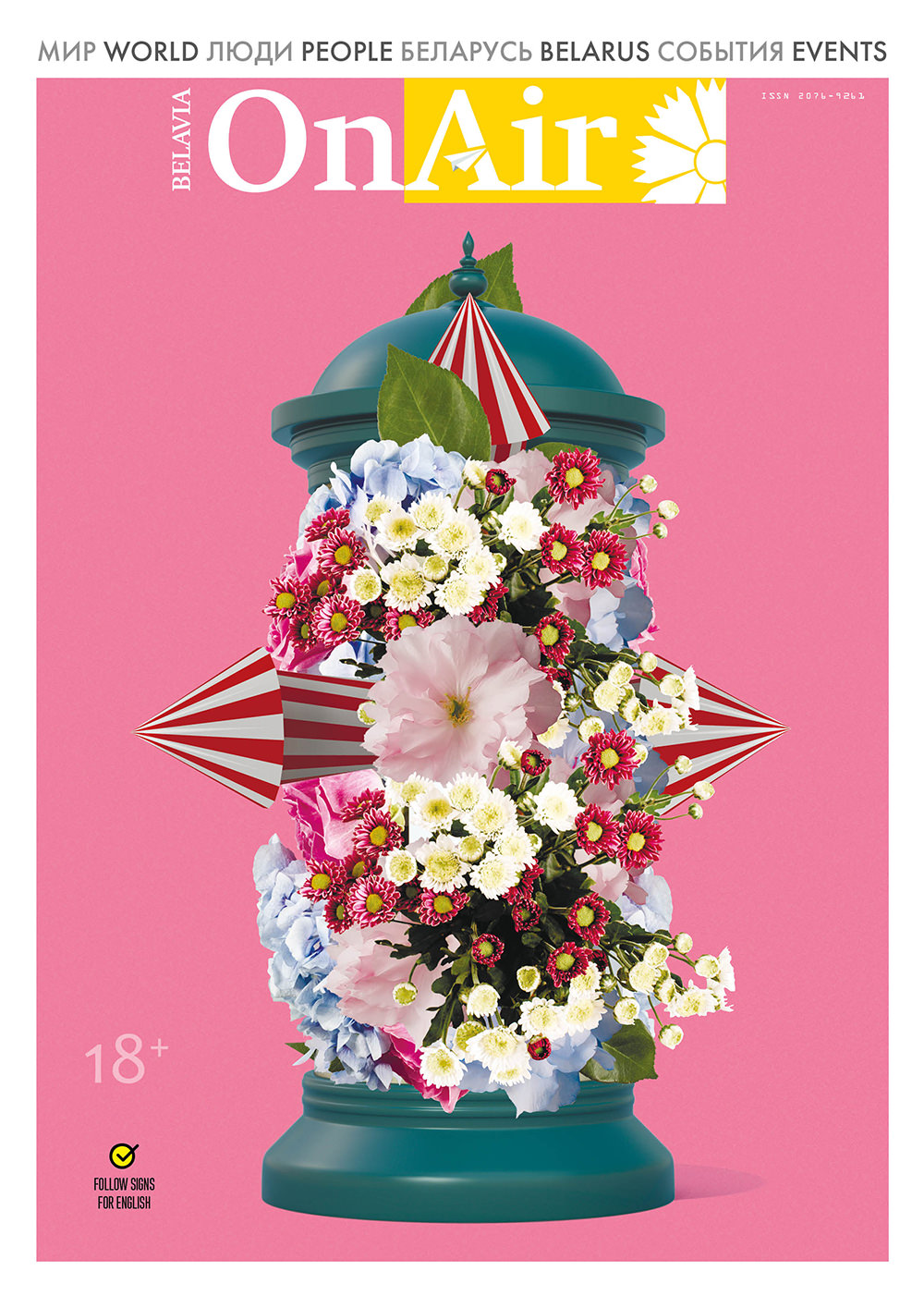 Зарегистрировано в Министерстве информации Республики Беларусь, № 761 от 6 ноября 2009 года. Учредитель ООО «РЕМАРК». Республика Беларусь. УНП 100174623.